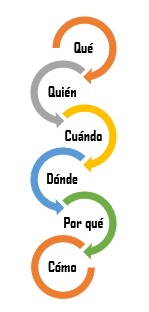 5W: qué, quién, cuándo, dónde, por qué + cómo